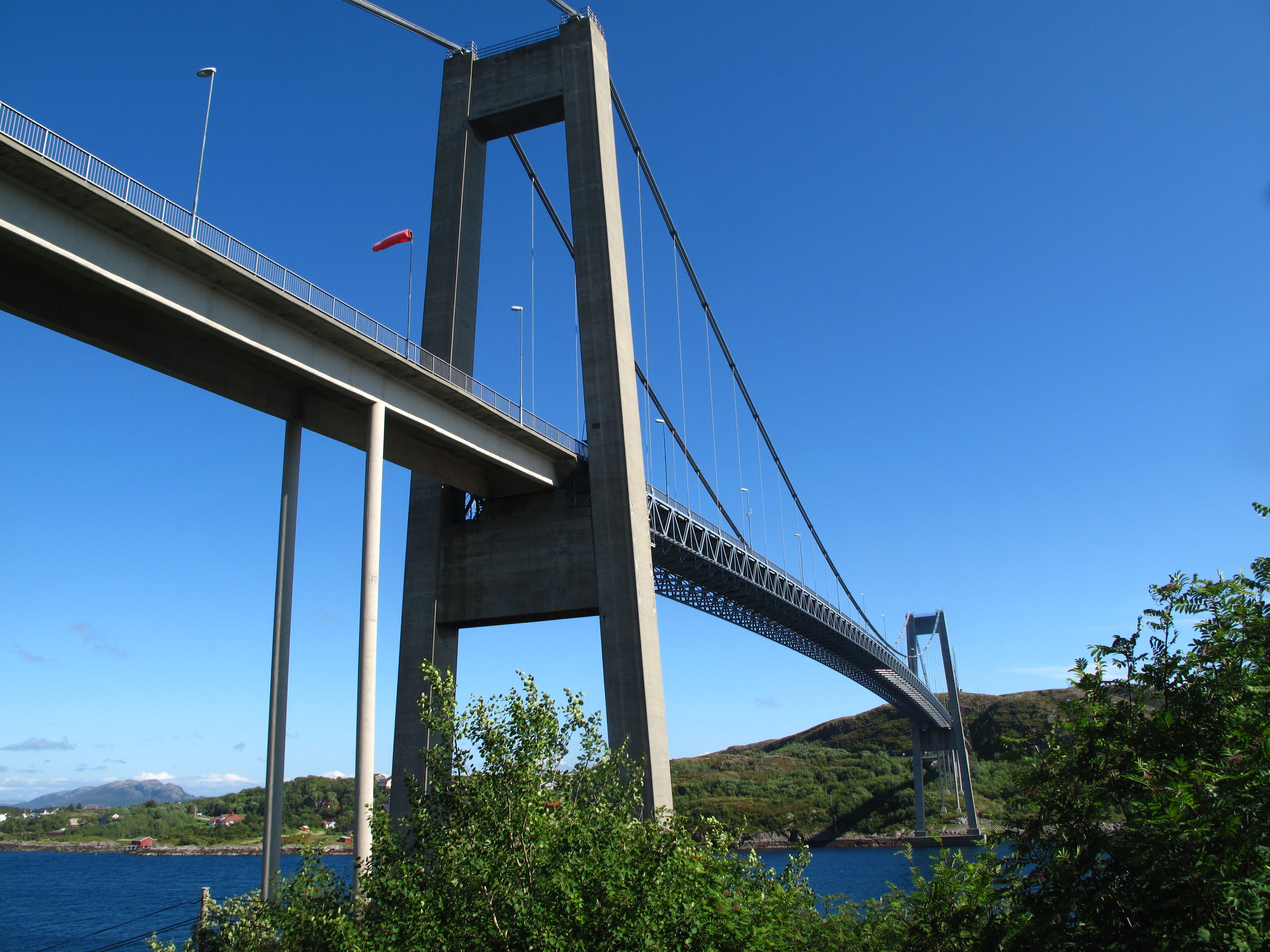 Nærøysundbrua, Rørvik